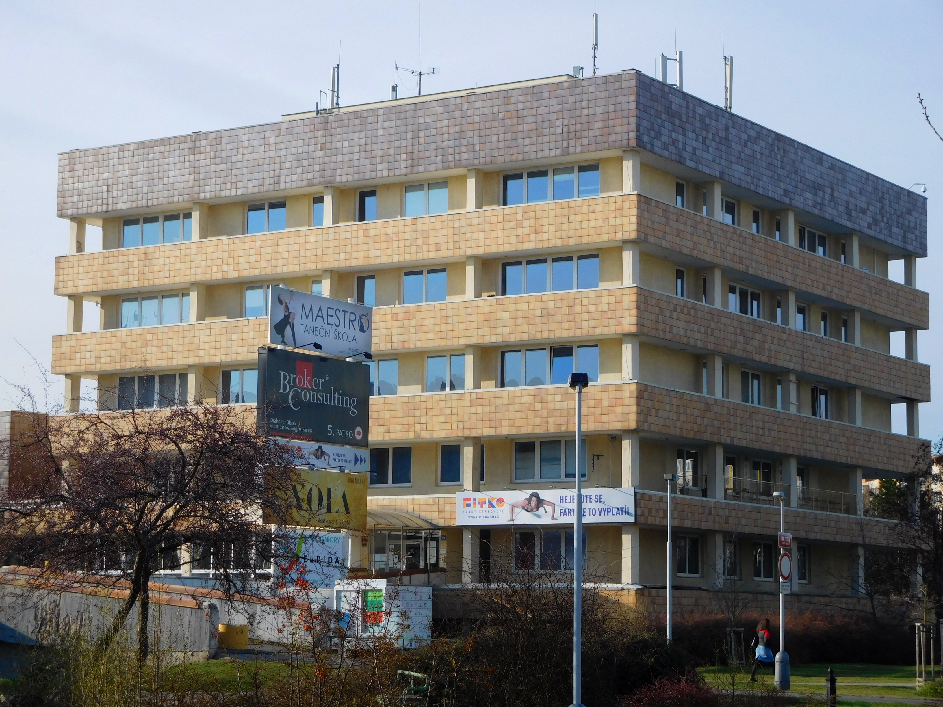 Praha - Pankrác, Na Strži 40 - Elpida